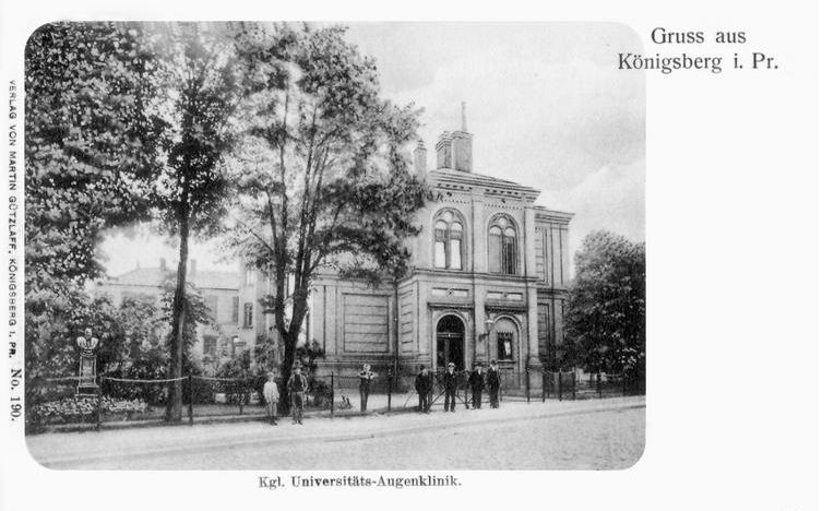 Fotografie der ersten Universitätsaugenklinik in Königsberg i. Pr. (1877)